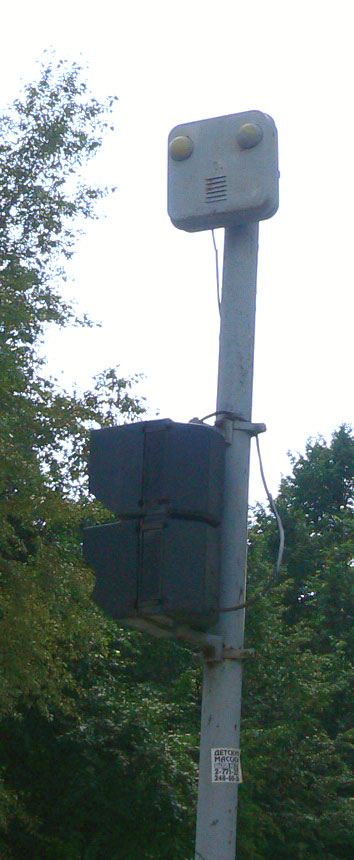 Звуковой модуль светофора для слепых пешеходов